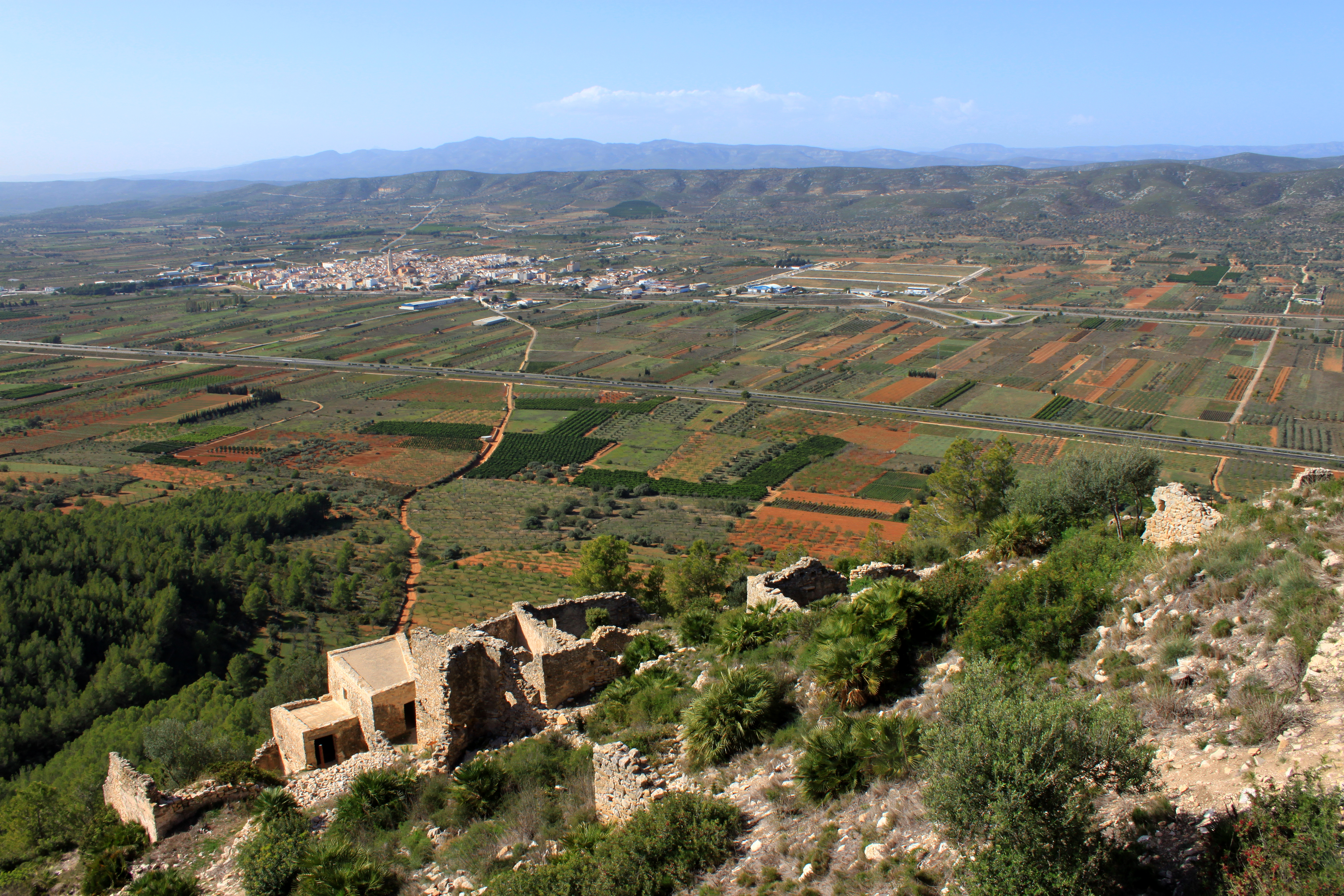 Castillo de Xivert. Vista del poblado andalusí construido en el siglo XIII y de la actual localidad de Alcalá de Xivert desde el emplazamiento del castillo. Alcalá de Xivert, provincia de Castellón, Comunidad Valenciana, España.